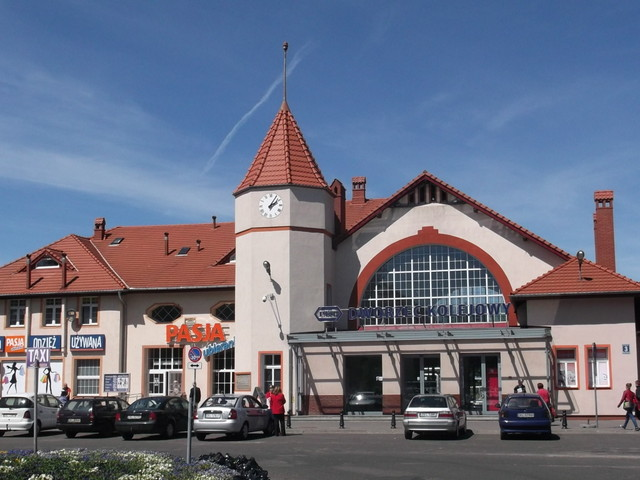 Kołobrzeg, dworzec kolejowy